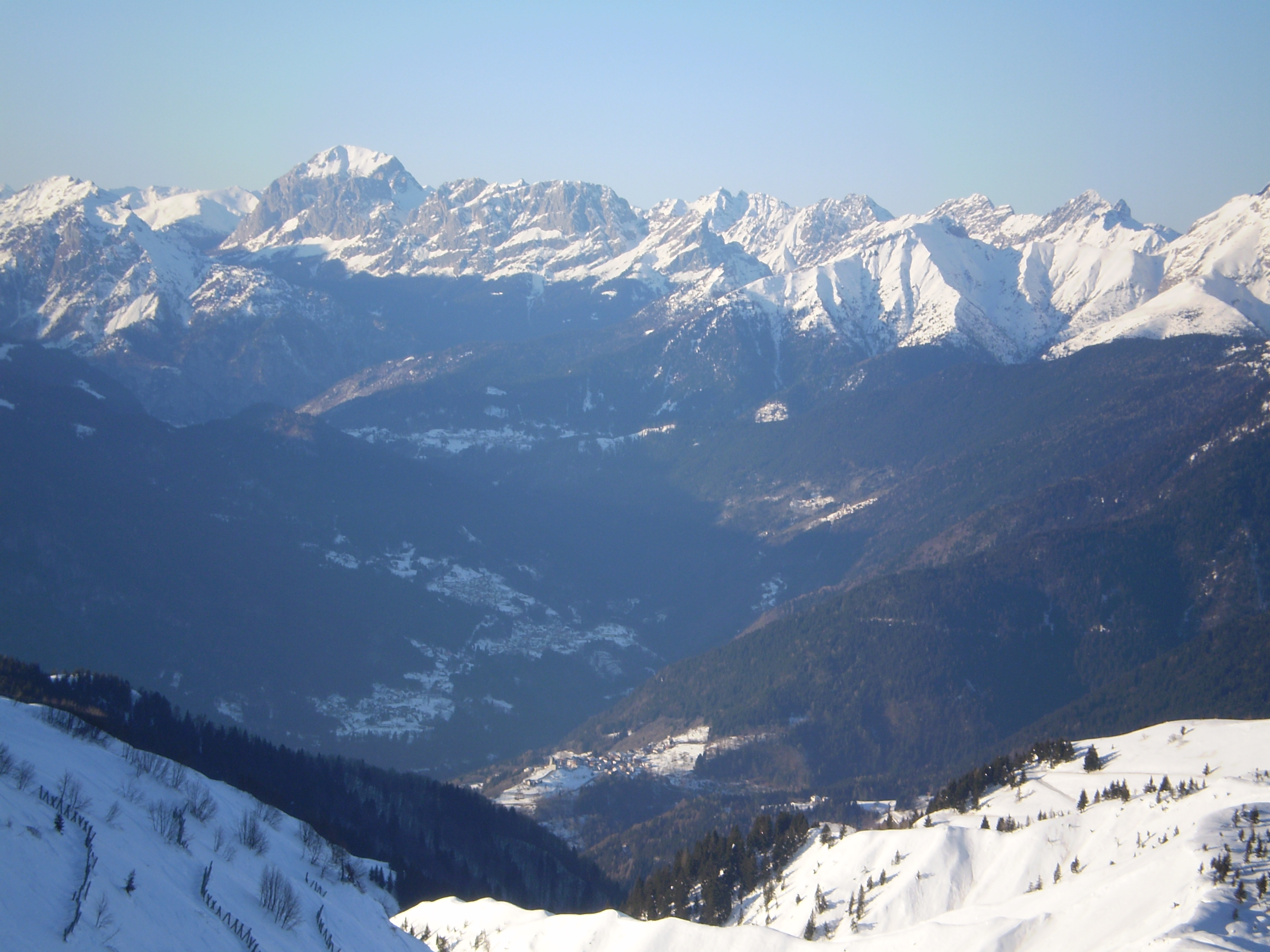 La Val Degano in veduta invernale